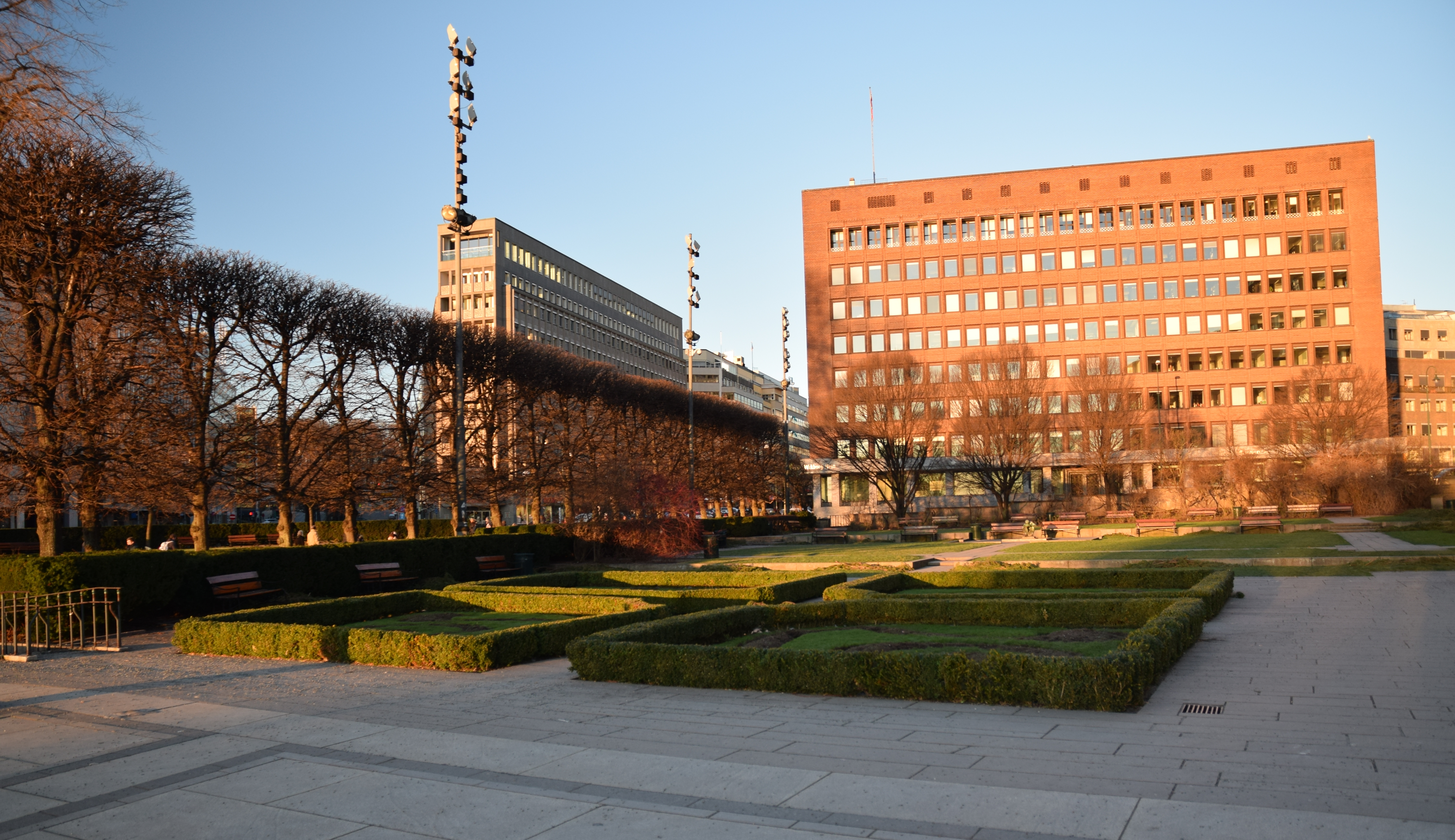 Rådhushagen (Kronprinsesse Märthas plass), Oslo, med lindealléen